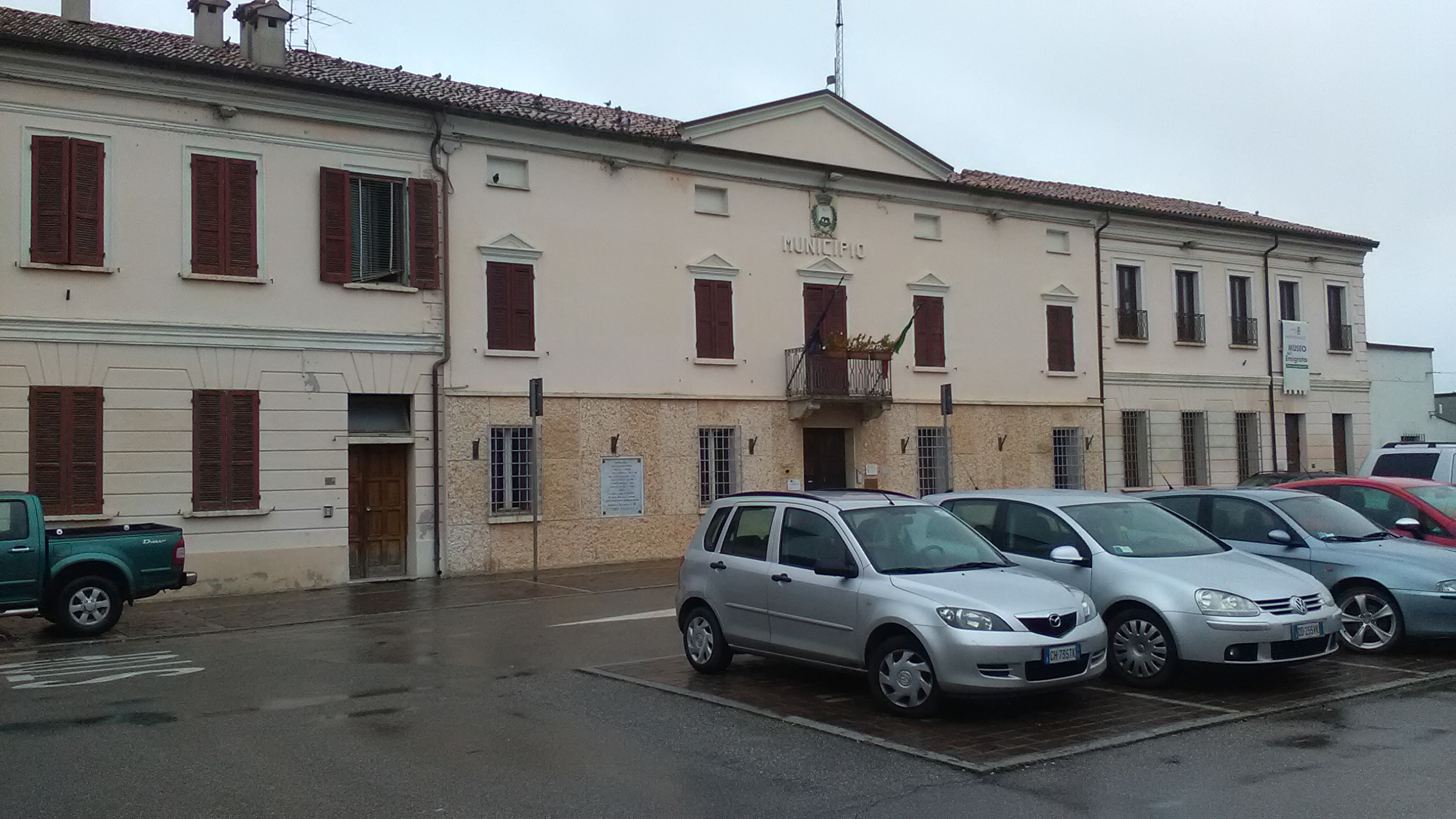 Piazza Guglielmo Marconi (Magnacavallo)